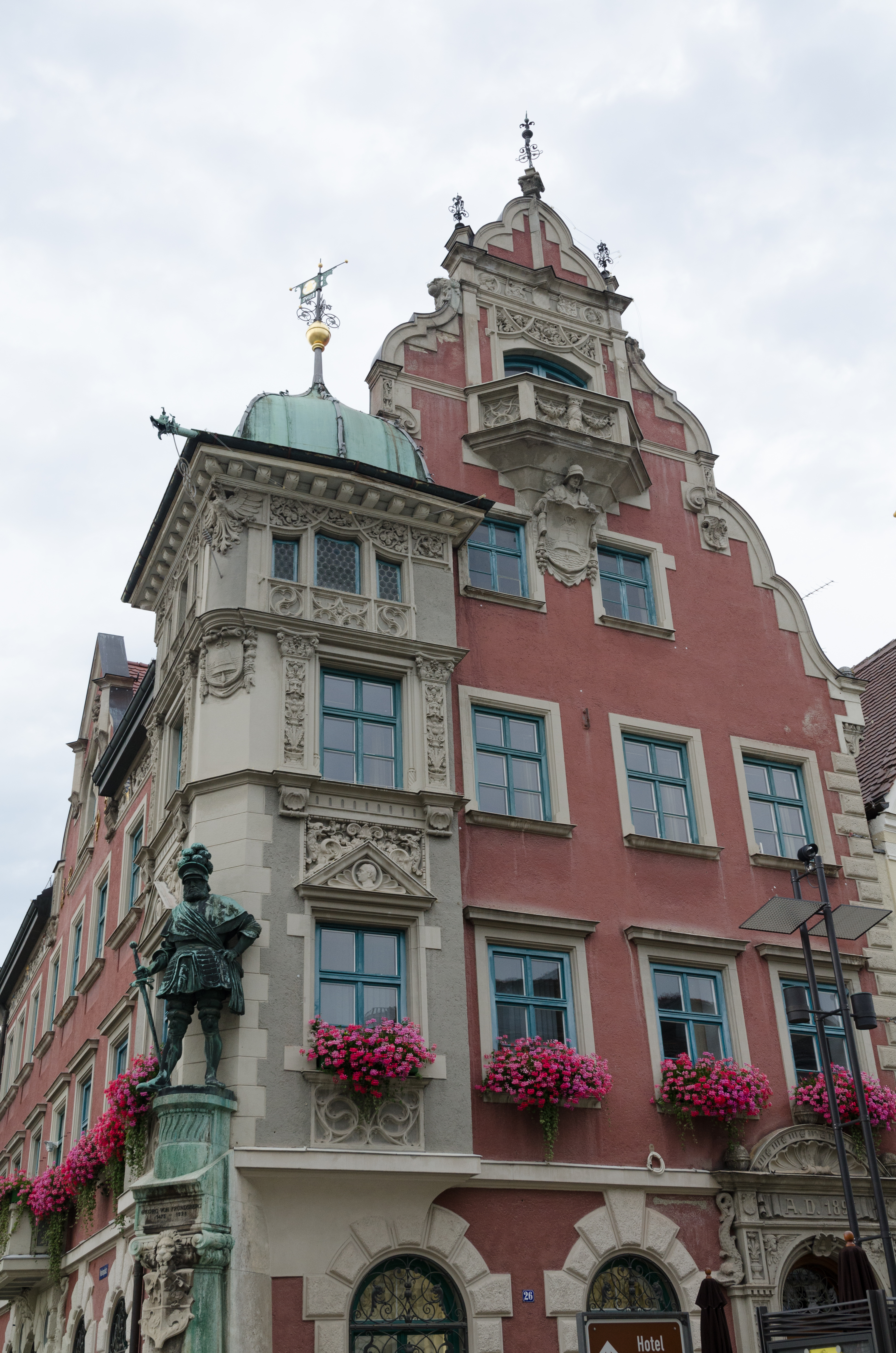 Mindelheim, Maximilianstraße 26